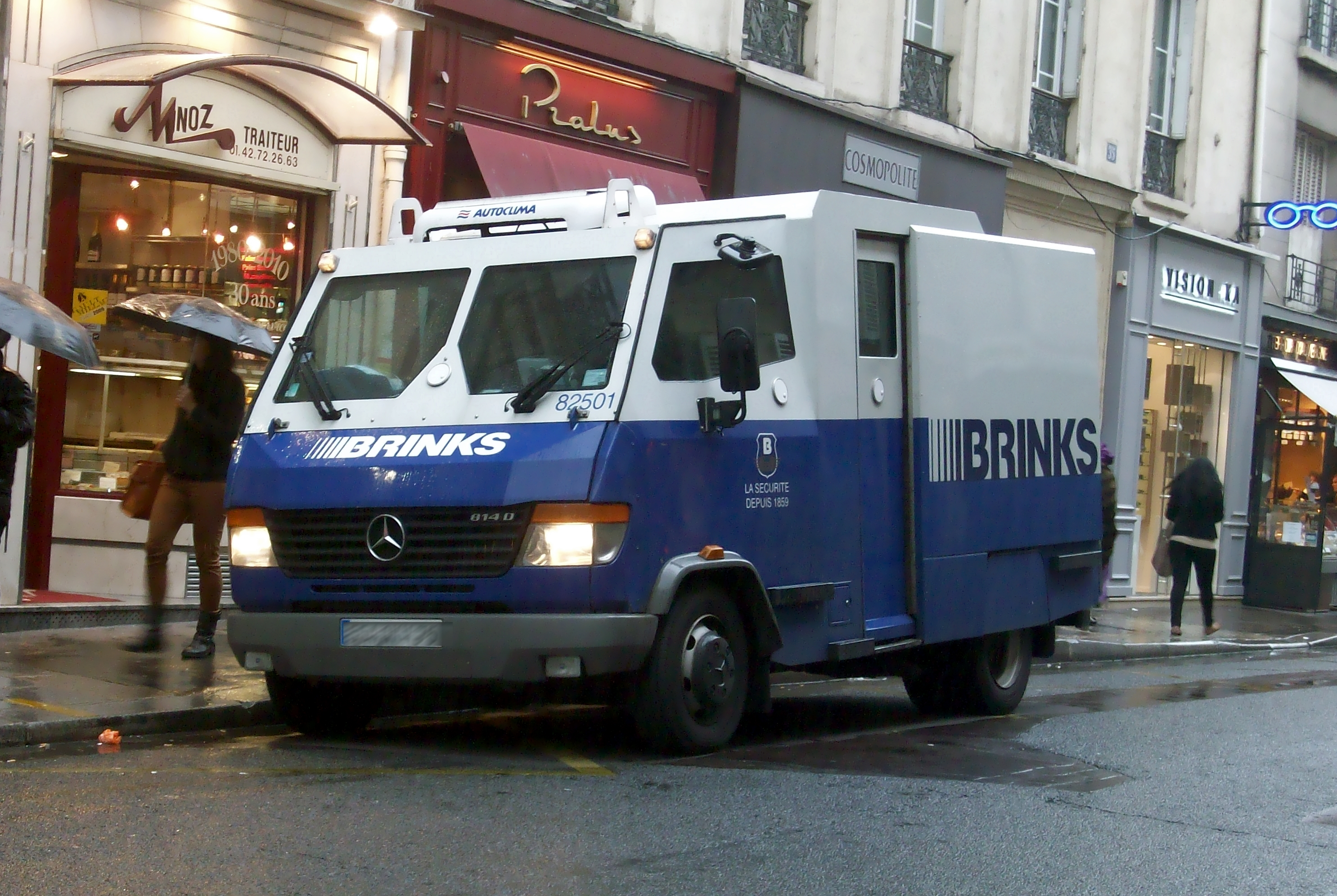 Fourgon blindé Mercedes-Benz Vario de la Brinks, à Paris.